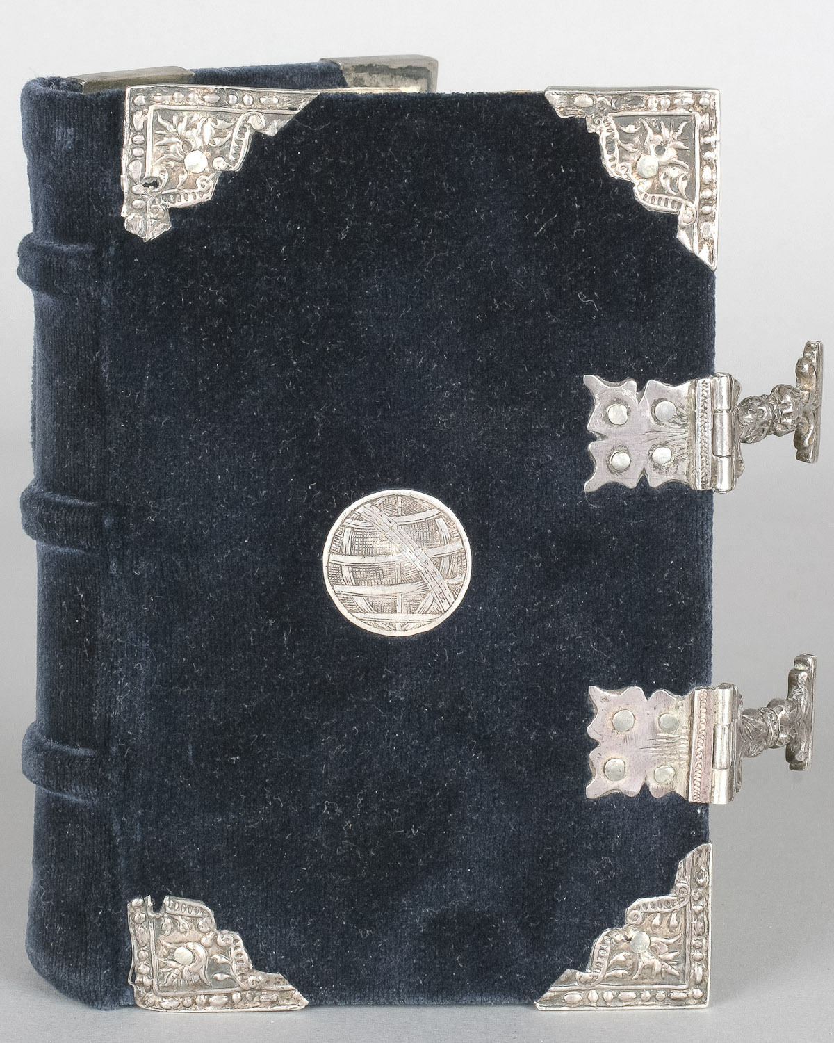 Reliure de velour bleu nuit, ornée par huit écoinçons et deux fermoirs en argent repoussé, au centre des plats, une sphère armillaire en argent ciselé, l'un des symboles de l'imprimeur Hardouin. Date : 1527-1550. Sujet : Heures de la Vierge Marie nouvellement imprimées selon l'usage de Rome ; cette reliure précieuse protège un livre d’heures de petit format. Notes : Plusieurs feuillets liminaires désigne la détentrice, Madeleine de Gournay, fille de Nicolas de Gournay et femme de Jacques de Raigecourt. La mère de ce dernier, Philippe de Pfaffenhoffen, était certainement la commanditaire. Bibliothèque-médiathèque de Nancy, Rés. 10 313. Plus de détails sur